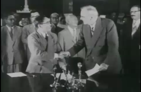 1953년 10월 1일 워싱턴 D.C.에서 대한민국의 외무부장관 변영태와 미국의 국무장관 존 포스터 덜레스가 한미상호방위조약에 서명하고 있다.